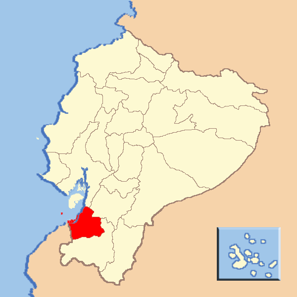 Provincia de El Oro